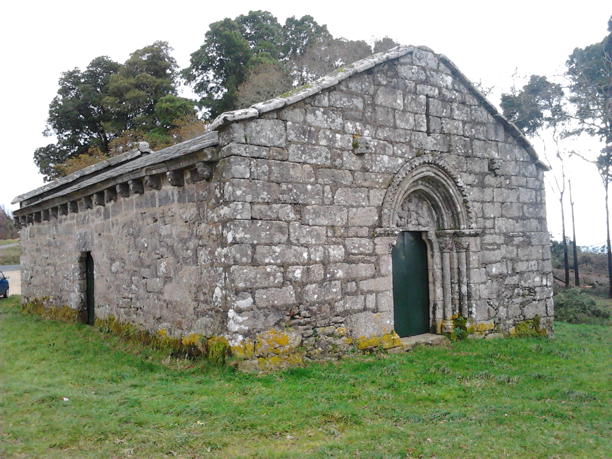 Ermida de San Cosme de Mántaras, concello da Irixoa